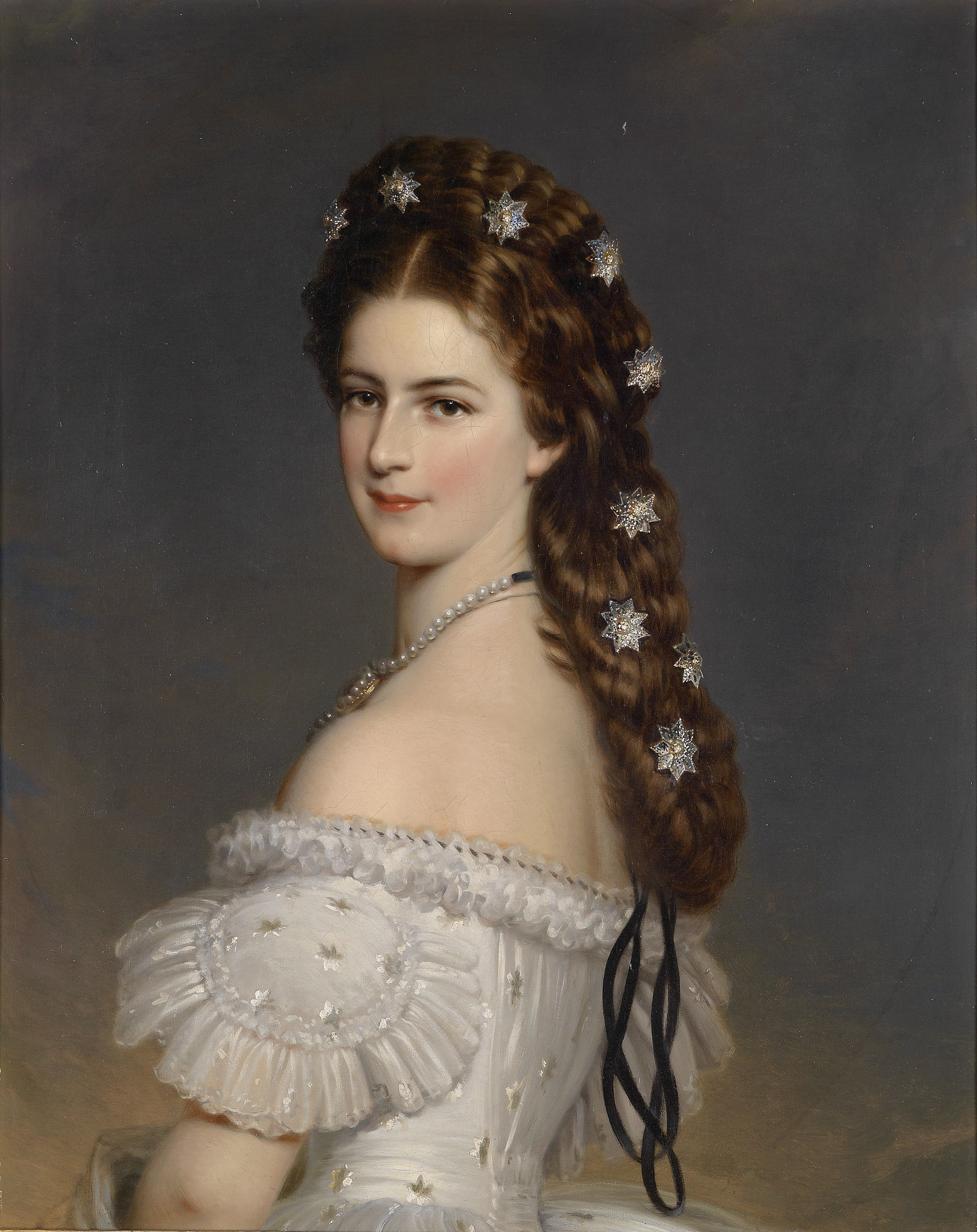 Kaiserin Elisabeth mit Diamentsternen im Haar (Werkstattwiederholung), Öl auf Leiwand, 80 x 64 cm, um 1860, Provenienz: Sammlung Pierre Charles Henri de Gontaut-Biron, Marquis de Saint Blancard (1859-1939), Paris und Genève, Sohn von Etienne Charles de Gontaut, Marquis de Biron (1818-1871) und von Marie Charlotte Arabella de Fitz-James (1831-1905). Sammlung Gilonne Henriette Marie d'Harcourt (1876-1952), verheiratet mit Alexandre Auguste, Comte Catoire de Bioncourt (1863-1913). Sammlung Alexandra Wassiljewa Catoire de Bioncourt (1906-1956), verheiratet mit Gerard Laurent Auguste Sixte Francois de Loriol (1904-1973). Chateau d'Allaman, Pays de Vaud, Schweiz.